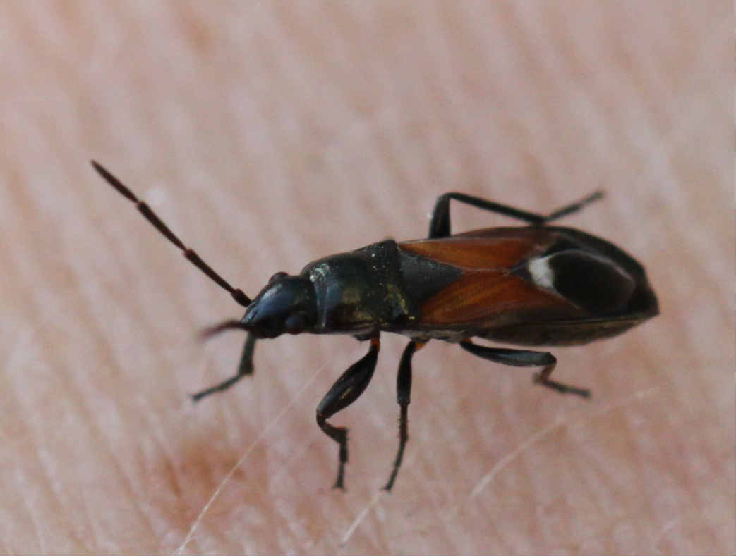 Pterotmetus staphyliniformis am 5.7.2017 in Oftersheim